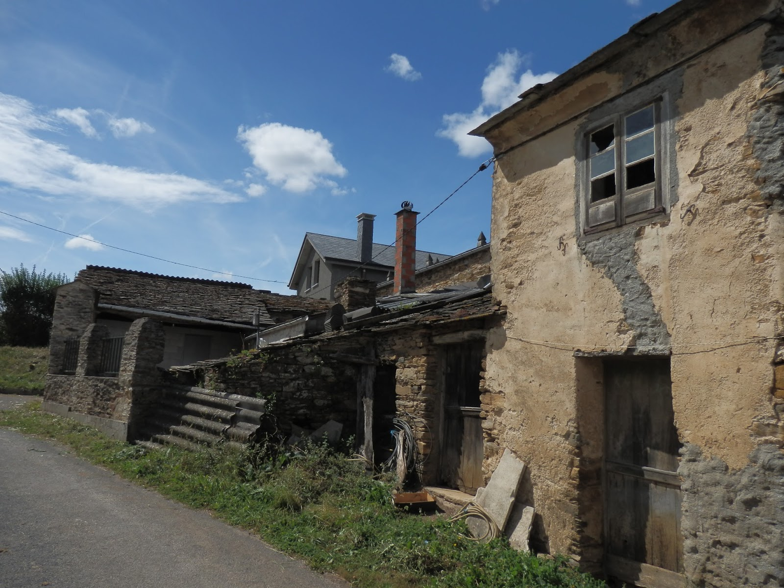 Casas no lugar de San Pedro, Santiago de Mondoñedo, Mondoñedo, España